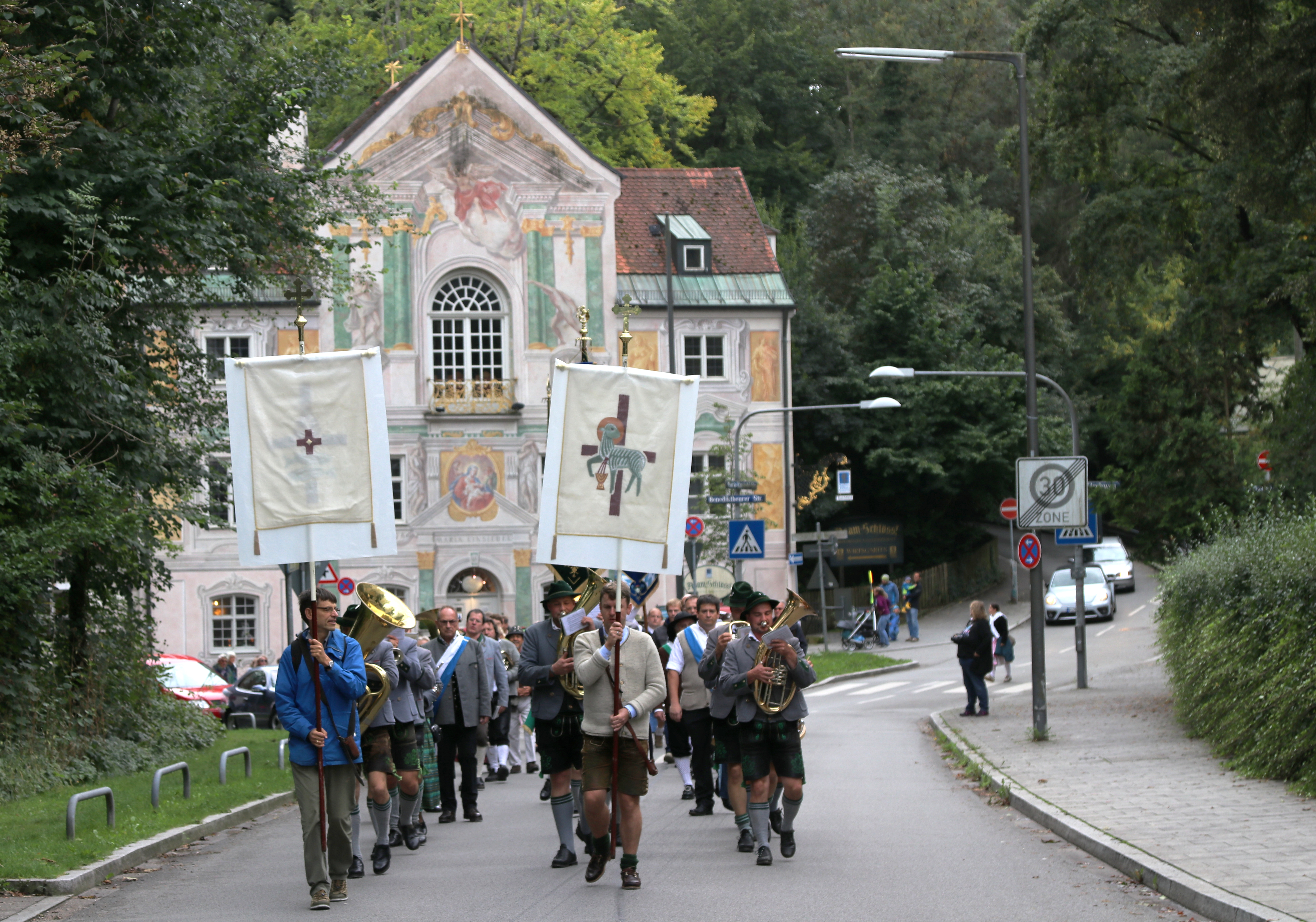 Flößerwallfahrt Thalkirchen 2018. Die Wallfahrt findet im fünf jährigen Turnuns statt und fährt auf der Isar von Wolfratshausen nach München-Thalkirchen. Landung der Flöße an der Floßlände und Prozession zur Kirche St. Maria Thalkirchen. Dort Heilige Messe. 2018 mit Weihbischof emeritus Franz Dietl.